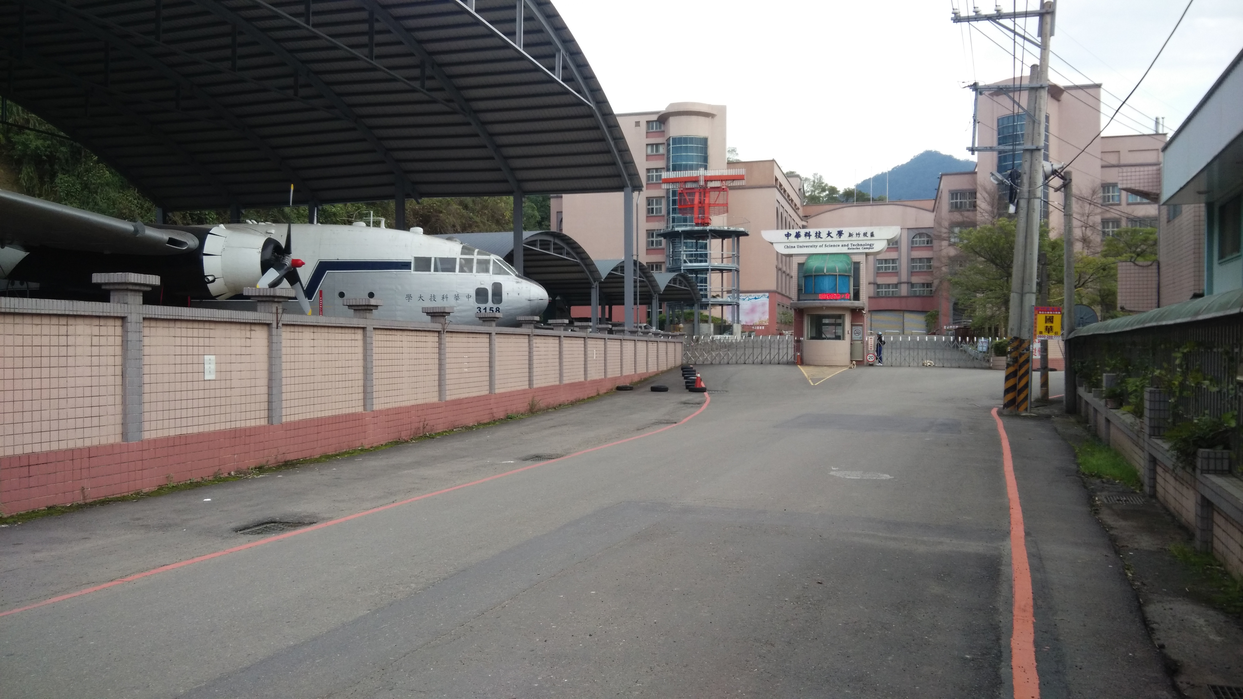 中文（台灣）: 中華科技大學新竹校區(航空學院)